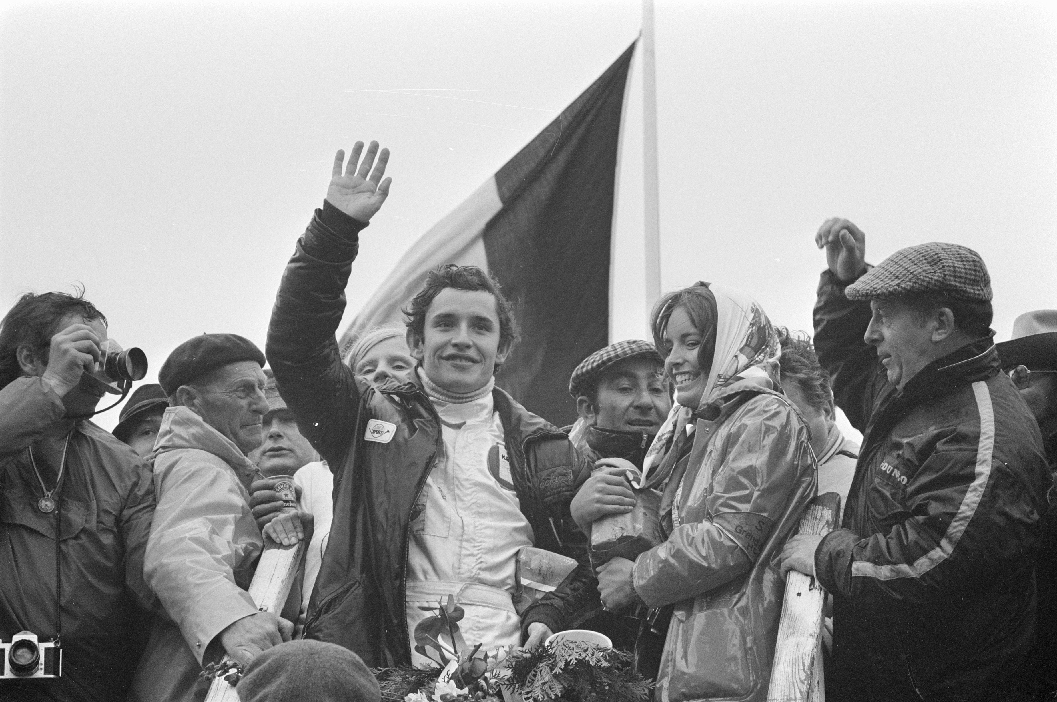 Collectie / Archief : Fotocollectie Anefo Reportage / Serie : Grote Prijs van Nederland Formule I wagen, Zandvoort Beschrijving : Huldiging van Jacky Ickx, rechts van hem zijn echtgenote Catherine Blaton Datum : 20 juni 1971 Locatie : Noord-Holland, Zandvoort Trefwoorden : autosport, circuits, huldigingen, kampioenen, races, wedstrijden Persoonsnaam : Blaton, Catherine, Ickx, Jacky Fotograaf : Fotograaf Onbekend / Anefo, [onbekend] Auteursrechthebbende : Nationaal Archief Materiaalsoort : Negatief (zwart/wit) Nummer archiefinventaris : bekijk toegang 2.24.01.05 Bestanddeelnummer : 924-6665